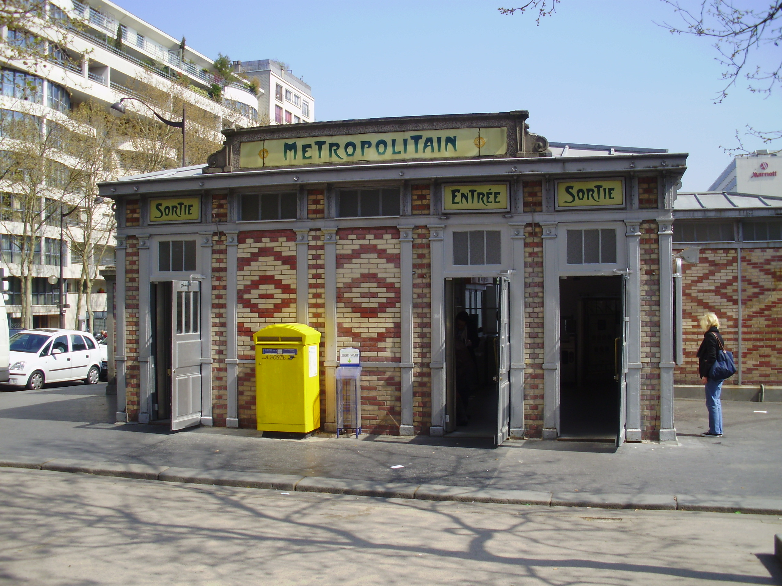 Entrée de la station Saint-Jacques du métro de Paris